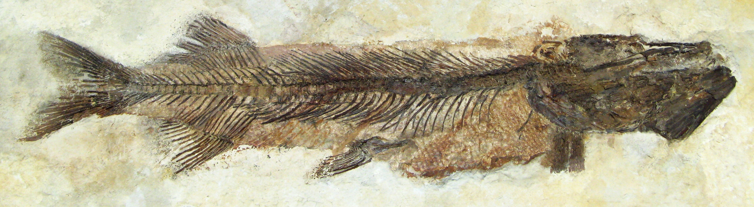 Fossiler Hecht (Esox) - aufgenommen im Museum am Löwentor, Stuttgart